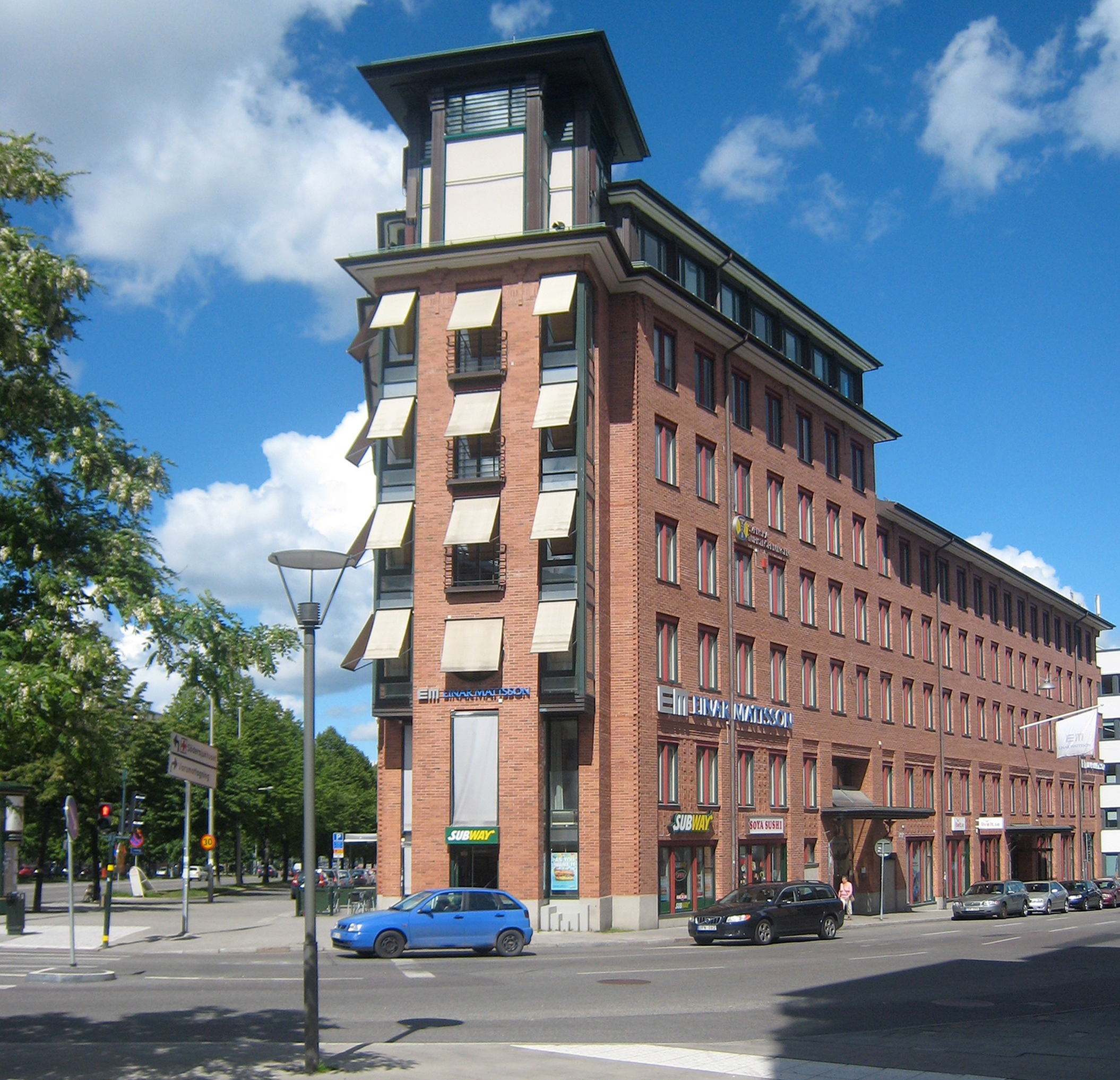 Einar Mattssson huvudkontor på Södermalm i korsningen Ringvägen/Rosenlundsgatan.